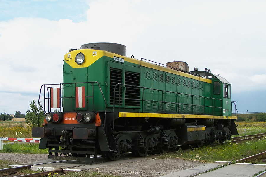 Lokomotywa SM48-086 manewruje na stacji Zawada.